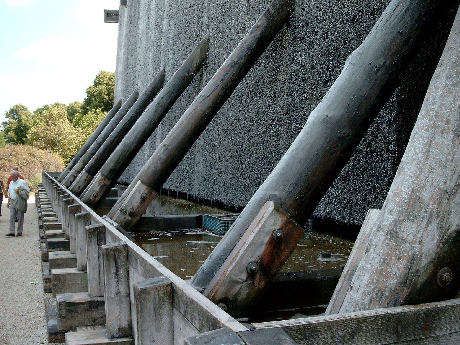 Die typischen Gradierwerke in Bad Rothenfelde aufgenommen in 2003